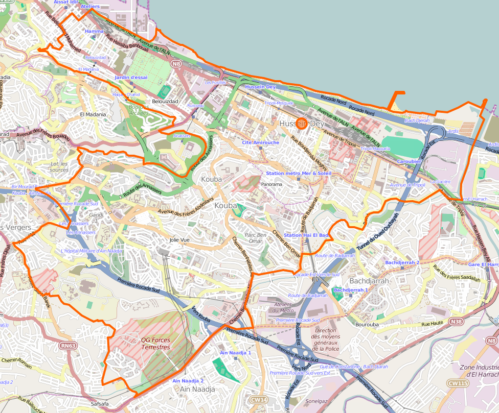 Plan de la Daïra d'Hussein Dey